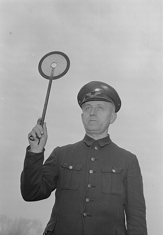 Original image description from the Deutsche Fotothek Porträt eines Schaffners